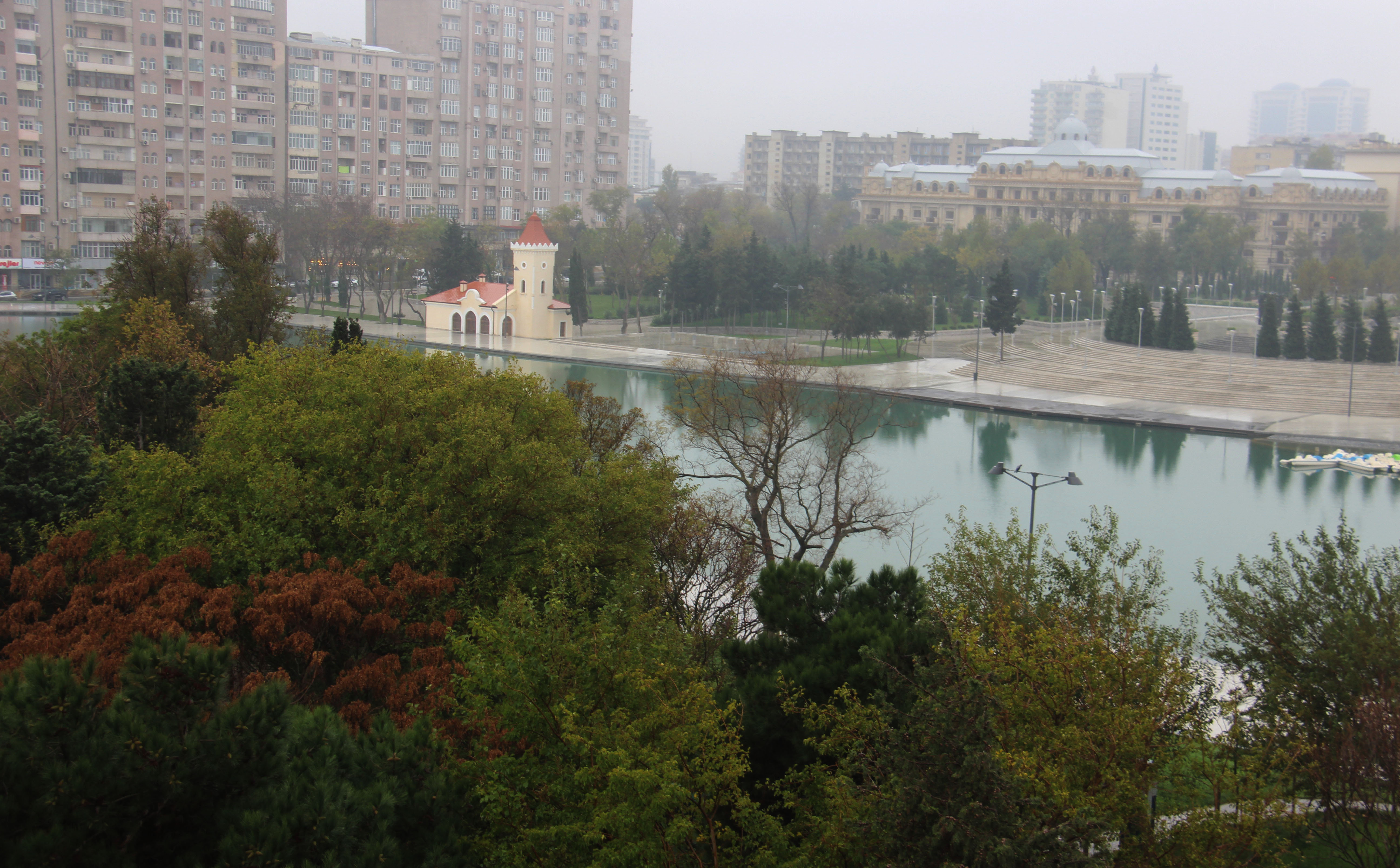 Dada Gorgud Park in Baku